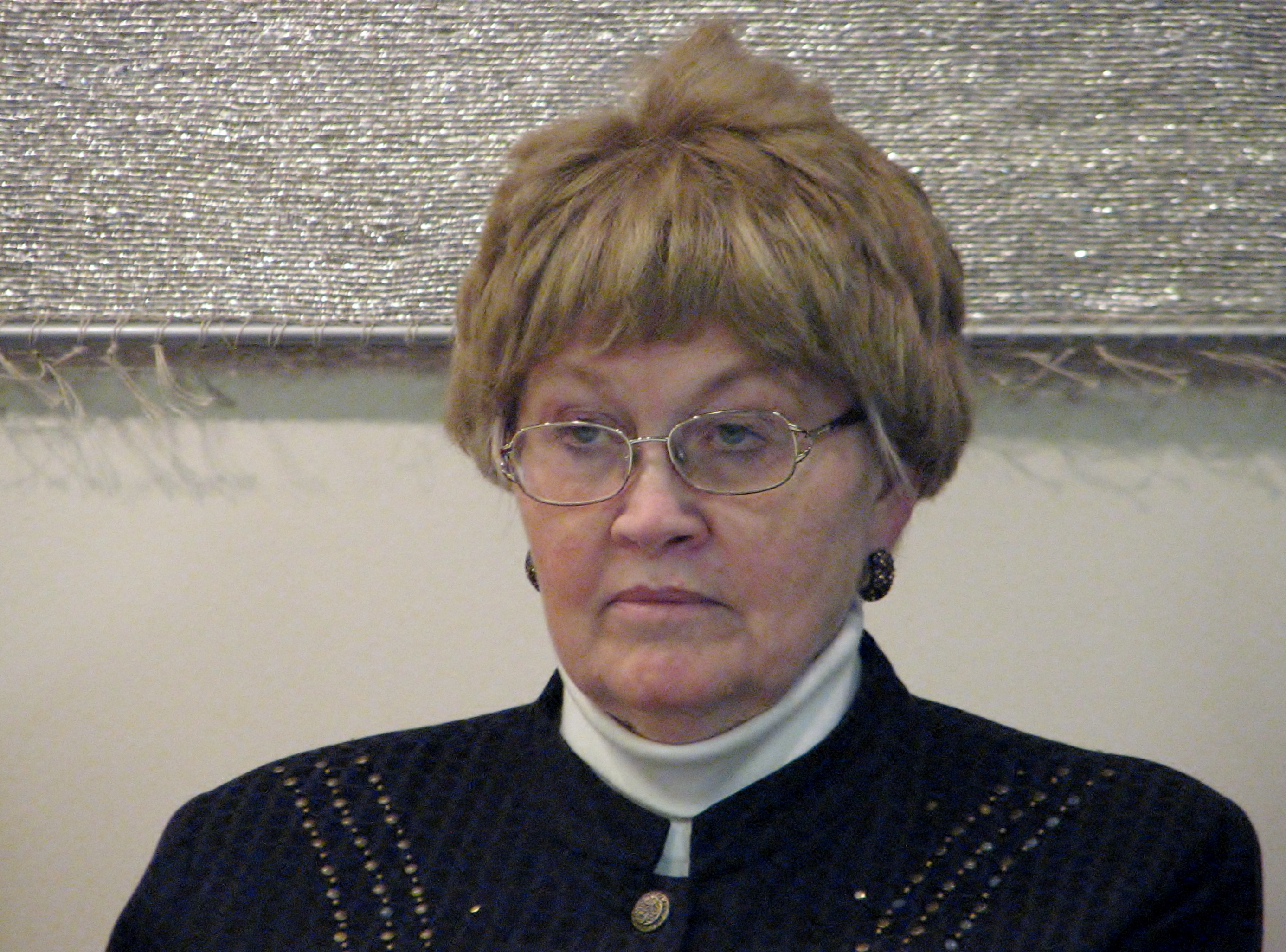 Nelli Abašina-Melts esinemas Tallinna Keskraamatukogu võõrkeelse kirjanduse osakonnas